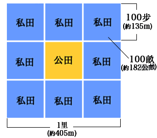 井田制的圖解。整片土地是一塊邊長1里(405m)的正方形。這塊正方形的土地可分為9塊面積等同，每邊邊長100步的較少正方形。中間的1塊田是公田，收益當作稅收；周圍的8塊田是私田，收益歸自己所有。